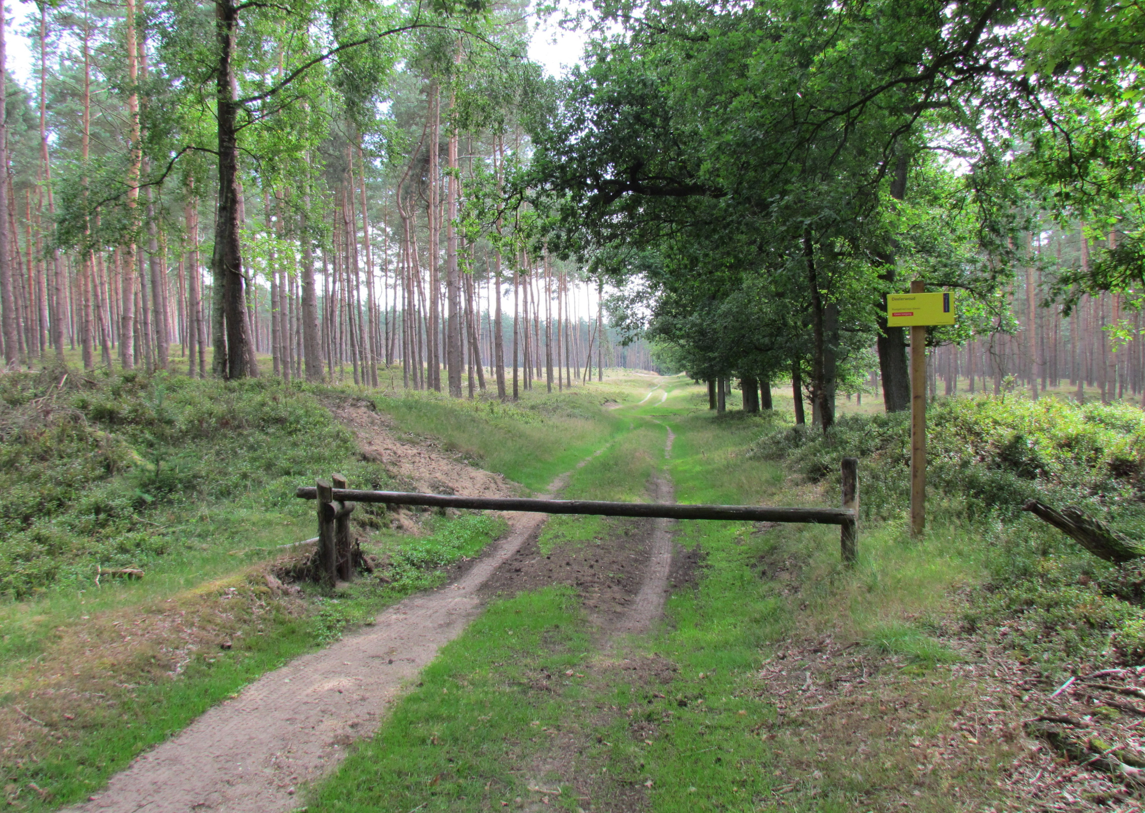 Deelerwoud bij de Lebretshoeveweg te Deelen (gemeente Ede, NL)